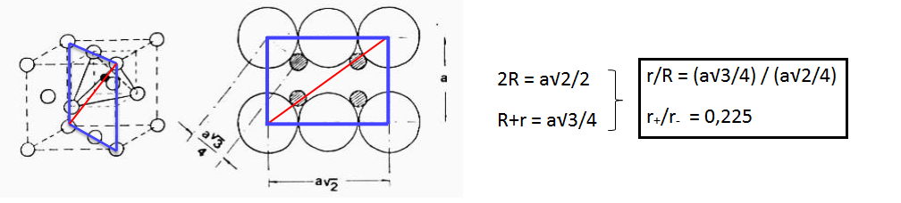 Hutsune tetraedrikoak